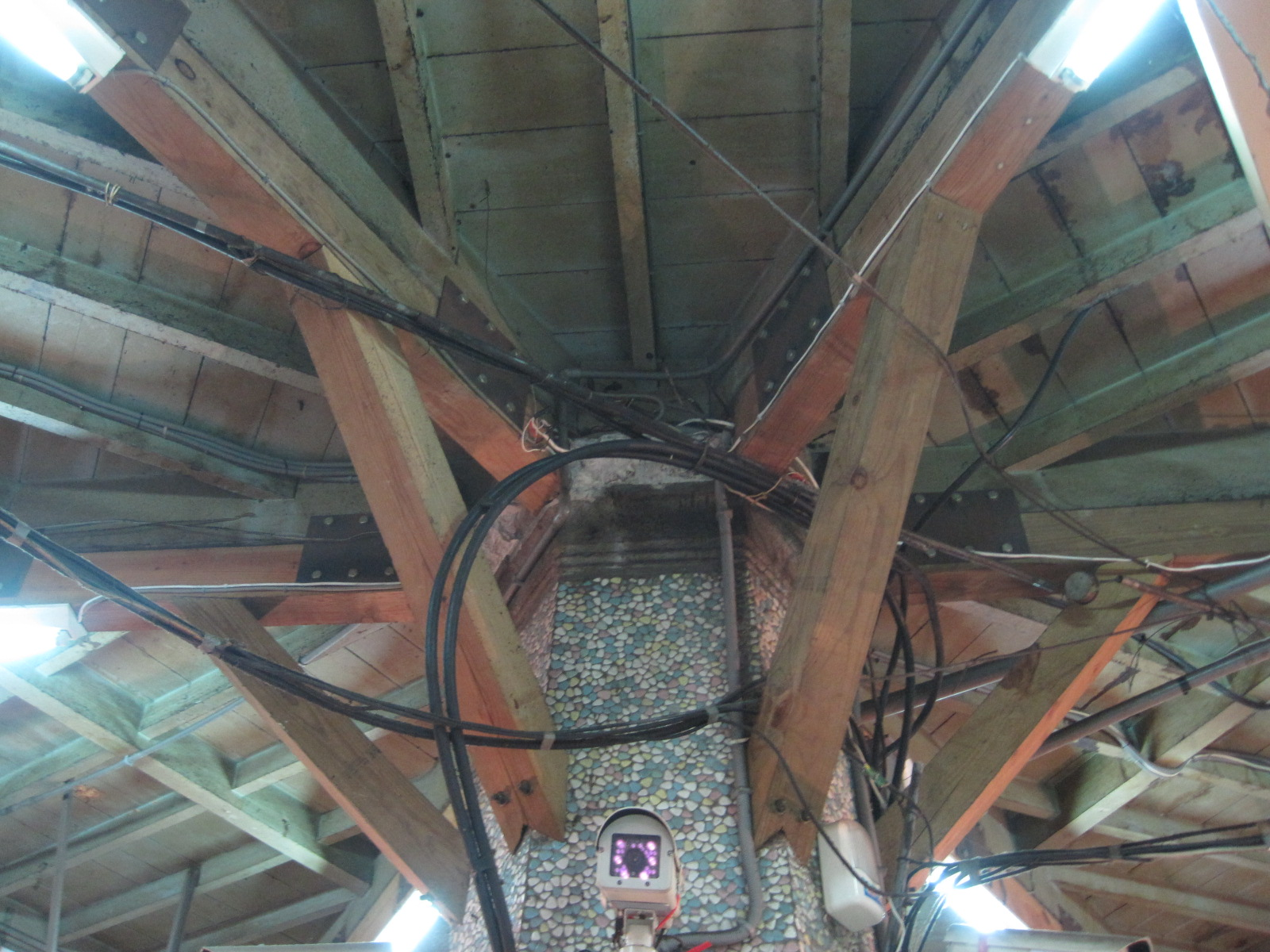 臺中第二市場六角樓底部。